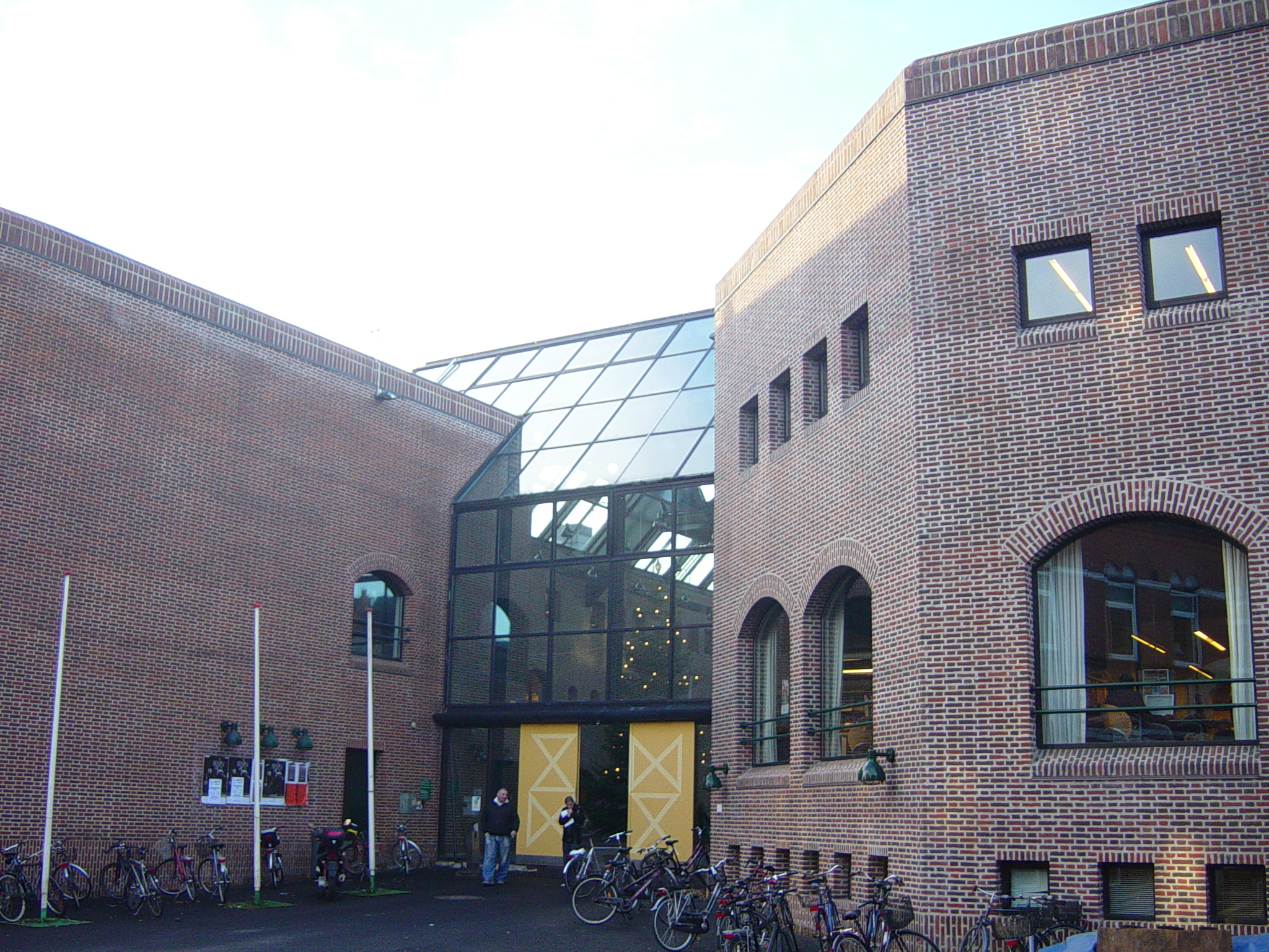 Holstebro Rådhus og Bibliotek på Kirkestræde 11, taget i brug i 1984